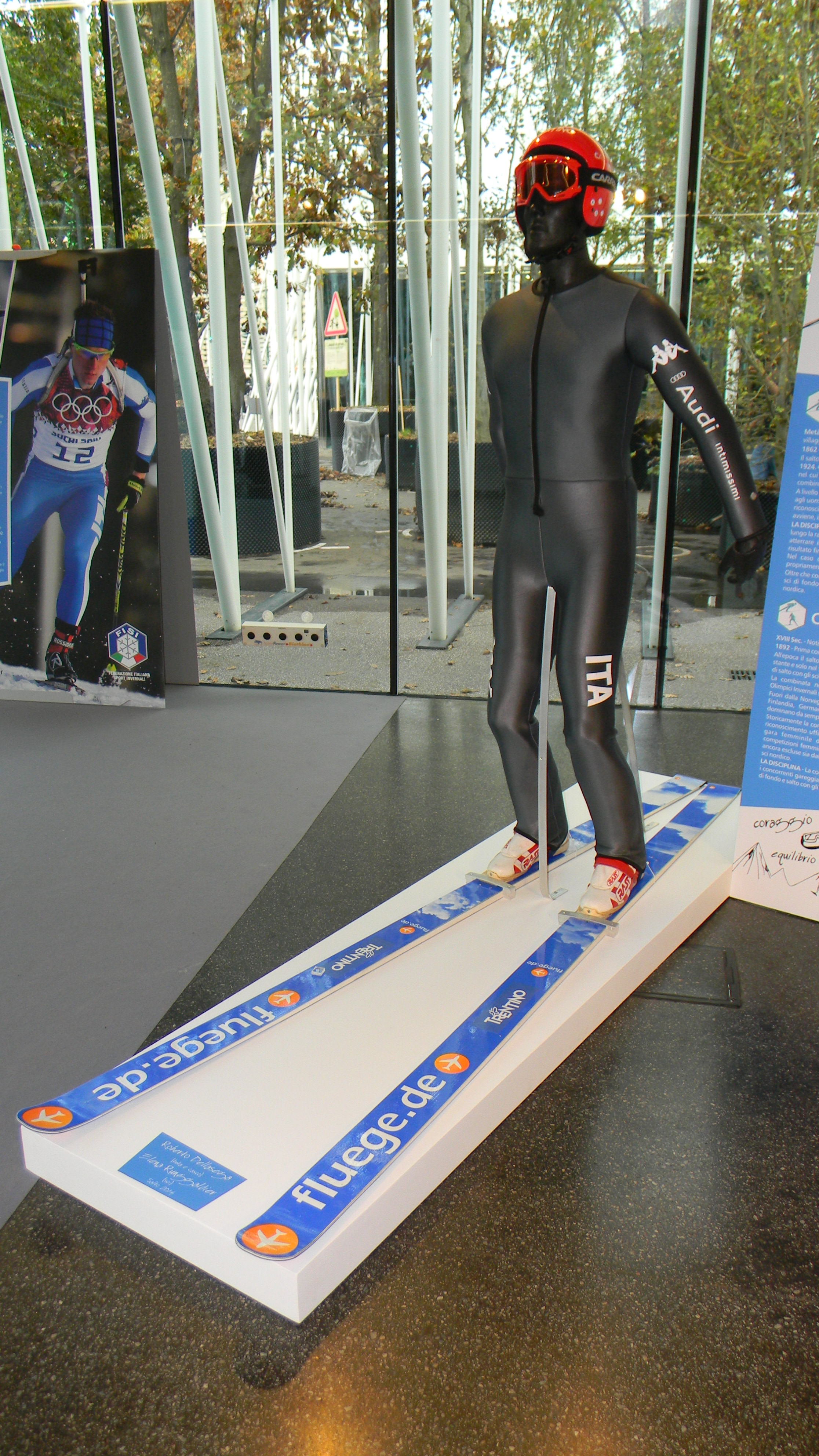 Attrezzatura per il salto con gli sci esposta all'ExpoGate di Milano nel 2014. Tuta, casco e occhiali sono stati usati da Roberto Dellasega, gli sci da Elena Runggaldier.